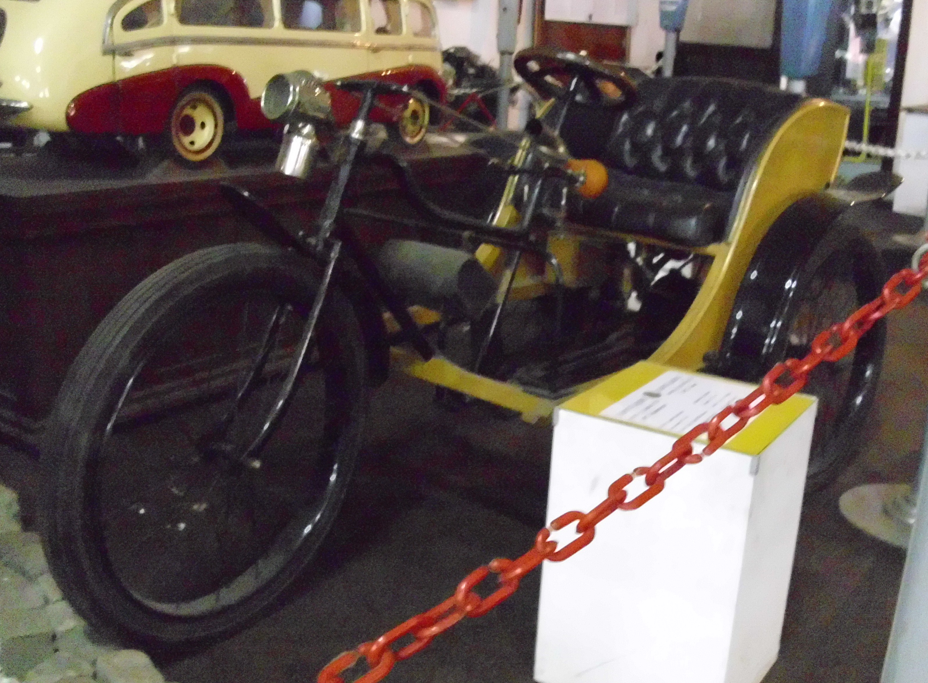 Marot-Gardon Tricycle 1898–1900 im Muzej automobila